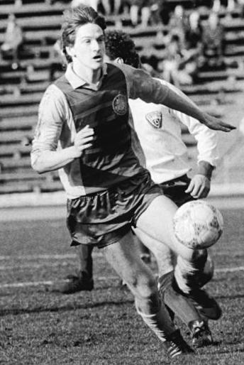 Title: BFC Dynamo - 1. FC Lok Leipzig 0:2 Factual corrections and alternative descriptions are encouraged separately from the original description. Additionally errors can be reported at this page to inform the Bundesarchiv. Original historic description: ADN-ZB-Oberst-12.3.88-mx-Berlin: Fußball-Oberliga- 16. Spieltag- BFC Dynamo - 1. FC Lok Leipzig- 0:2 (0:1)- Das Spitzenspiel zwischen Meister und Pokalsieger vor 12.000 Zuschauern stand eindeutig im Zeichen der Gäste. Hier setzt sich Frank Edmond (Lok) gegen Frank Pastor (BFC-halb verdeckt) durch. Weiter v.l.: Torsten Kracht, Ronald Kreer, Uwe Zötzsche (alle Lok).